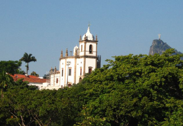 Gloria Church in Rio de Janeiro, Brazil